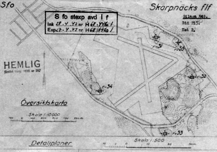 Skarpnäcks krigsflygfält karta